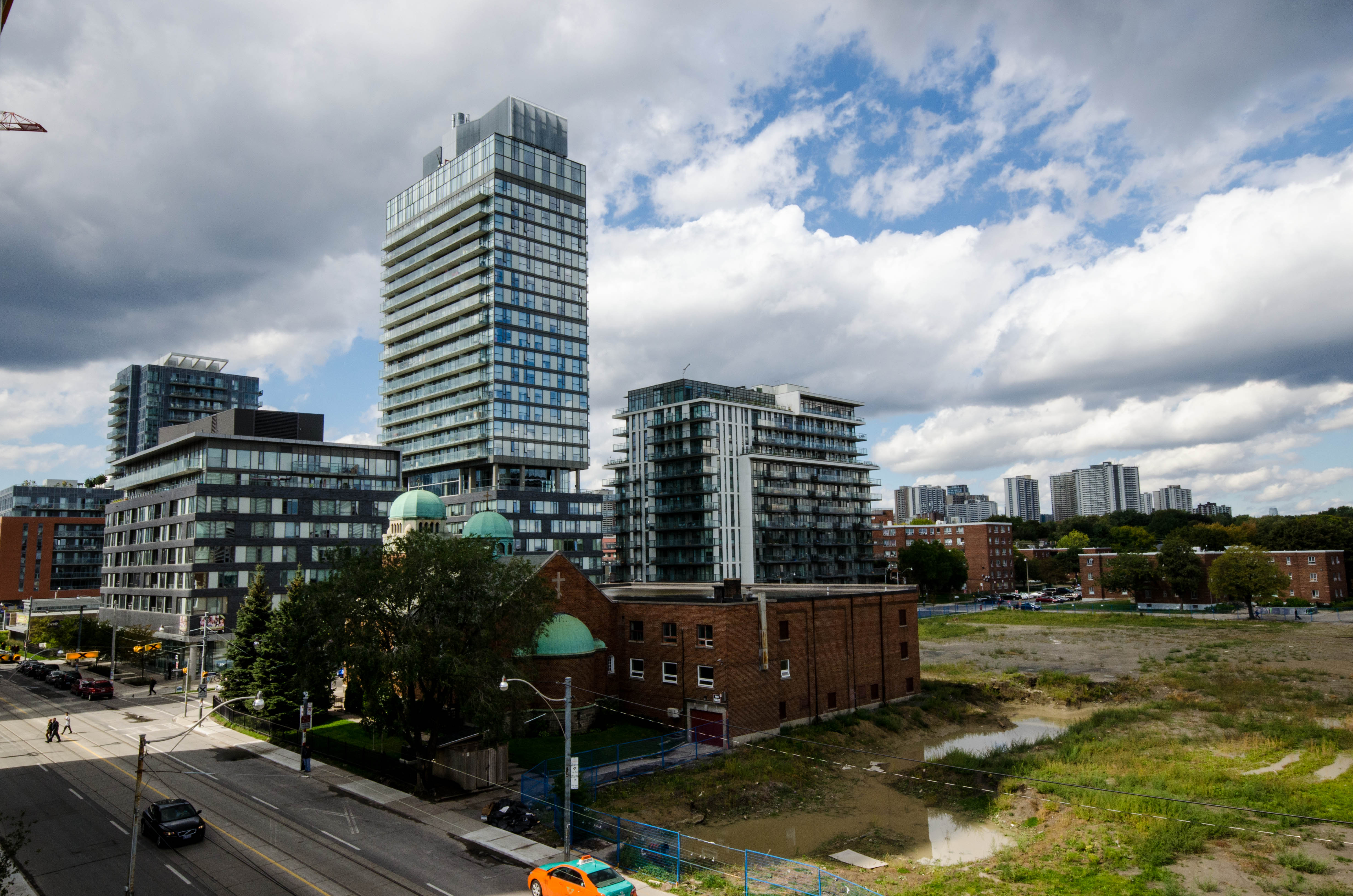 Daniel's Spectrum